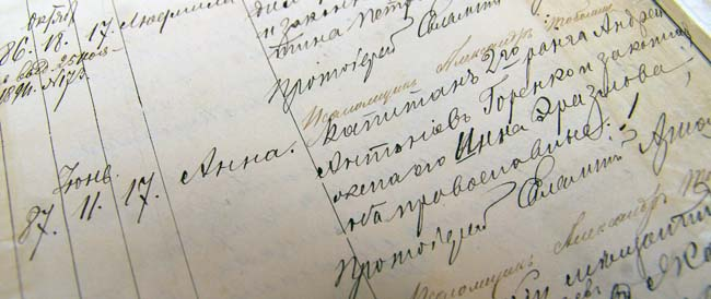 Запись в метрической книге о рождении Анны Горенко